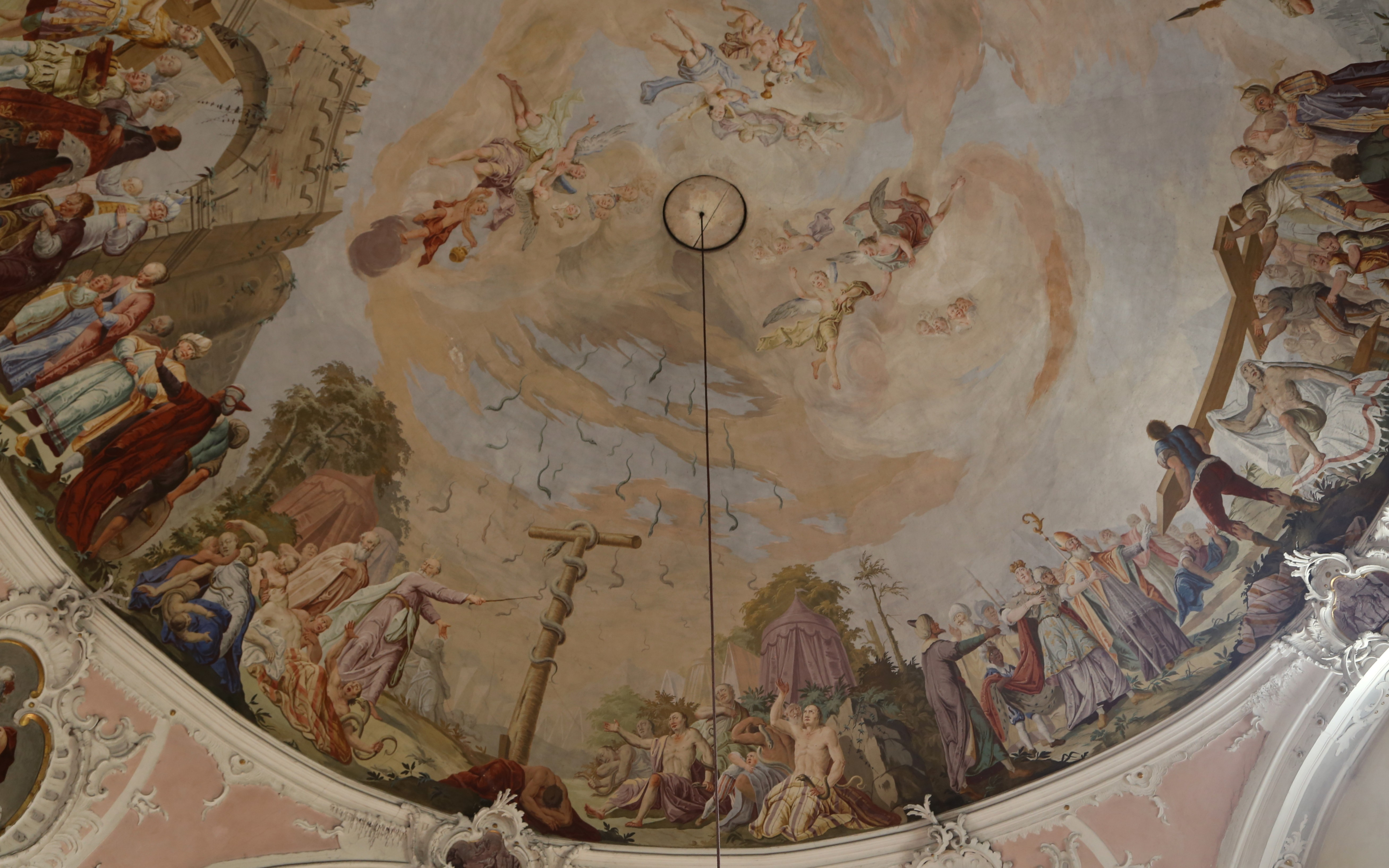 Katholische Pfarrkirche Hl. Kreuz, Going am Wilden Kaiser